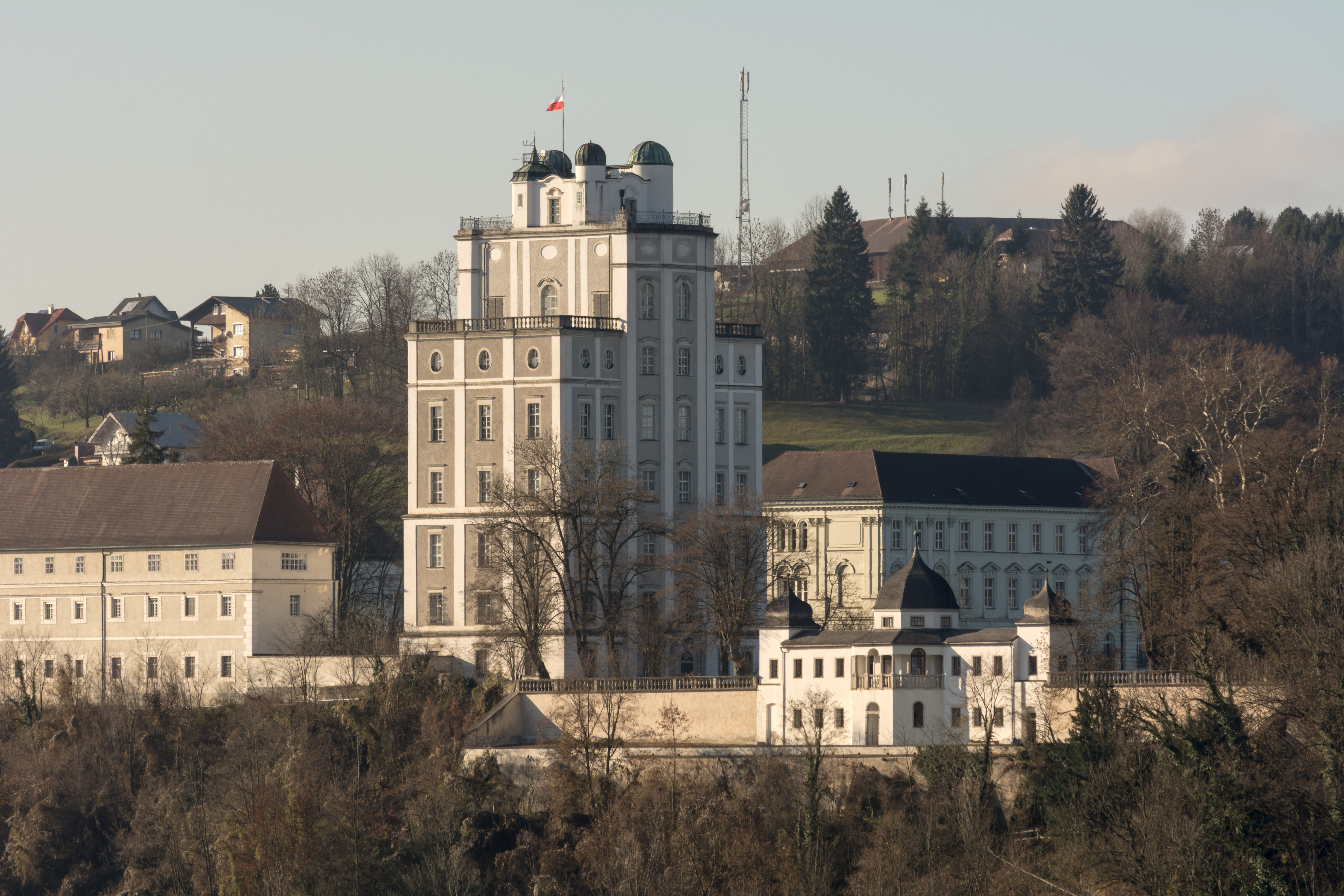 Die Sternwarte des Stiftes Kremsmünster, auch mathematischer Turm genannt, wurde in den Jahren 1748 bis 1759 erbaut.